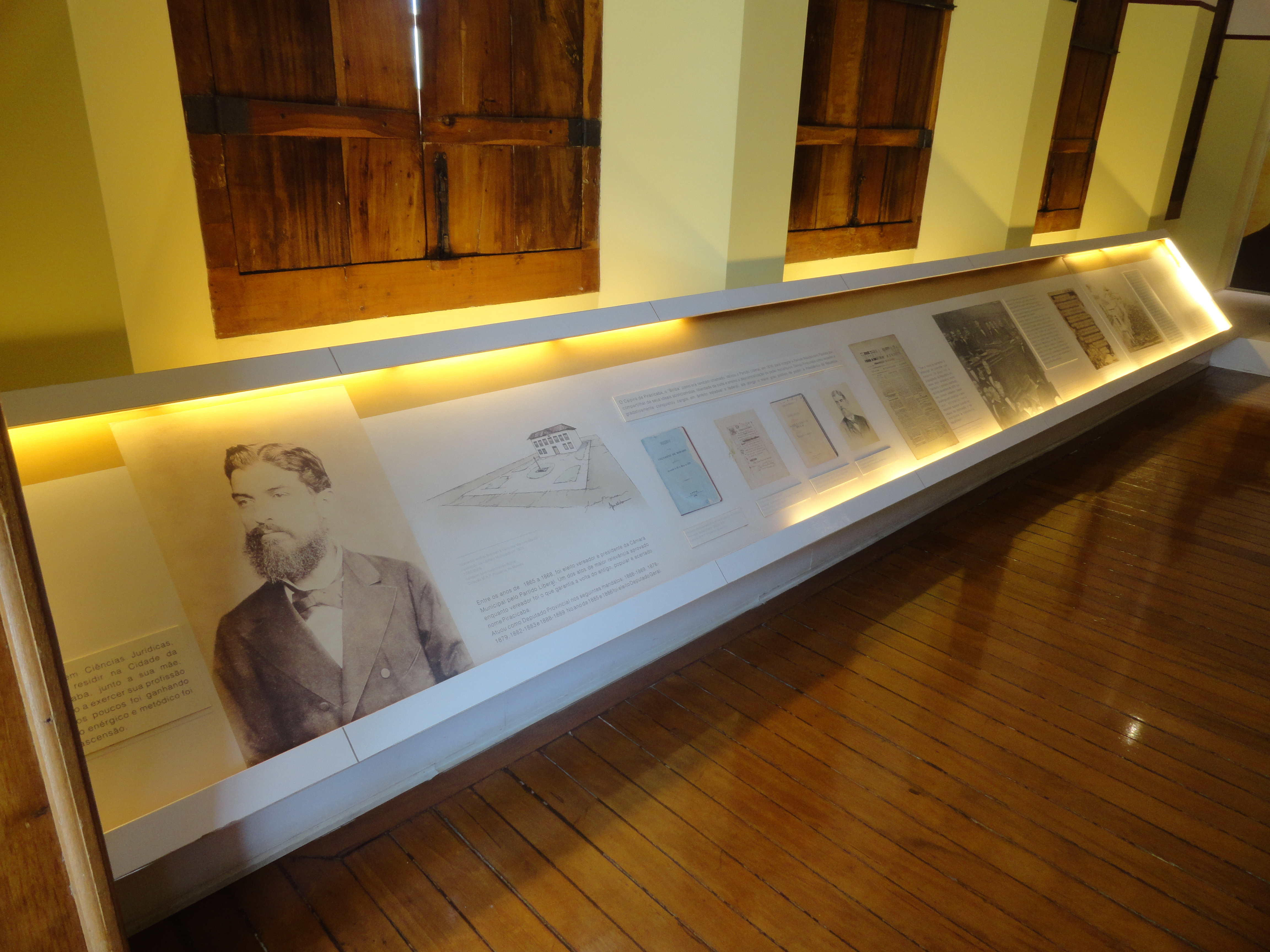 Acervo móvel depositado no atual “Museu Histórico e Pedagógico Prudente de Moraes”